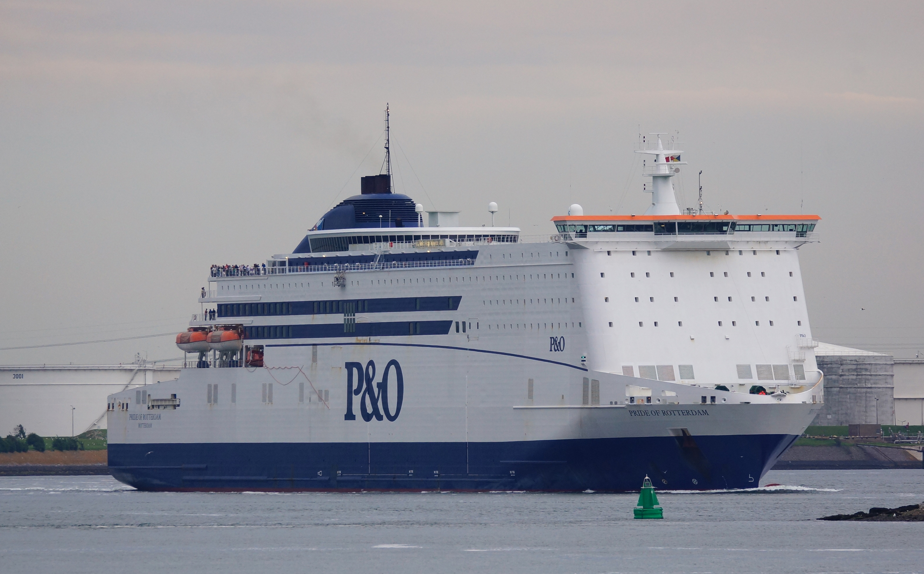 Calandkanaal 26-4-2014